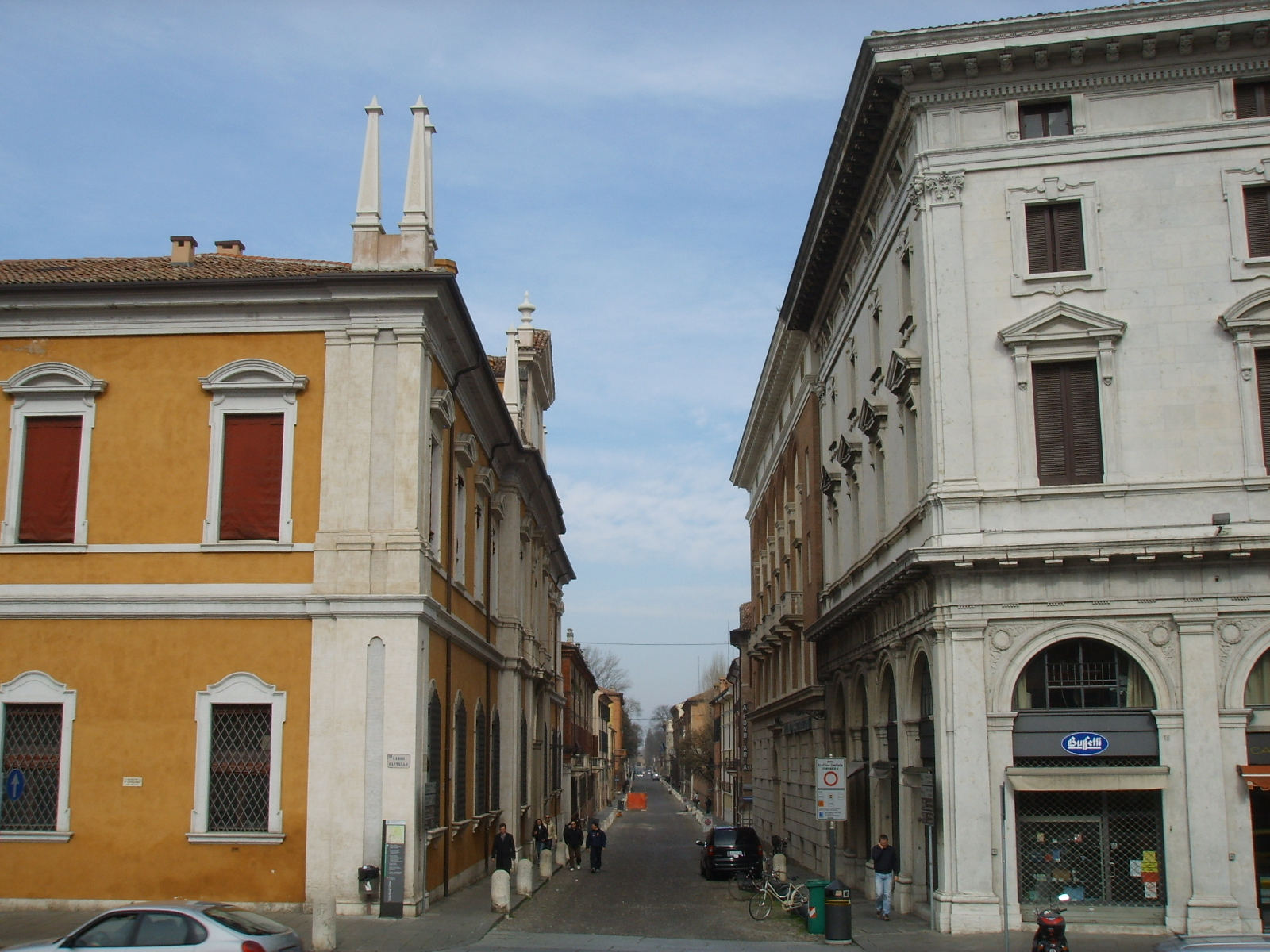 Corso Ercole I d'Este a Ferrara